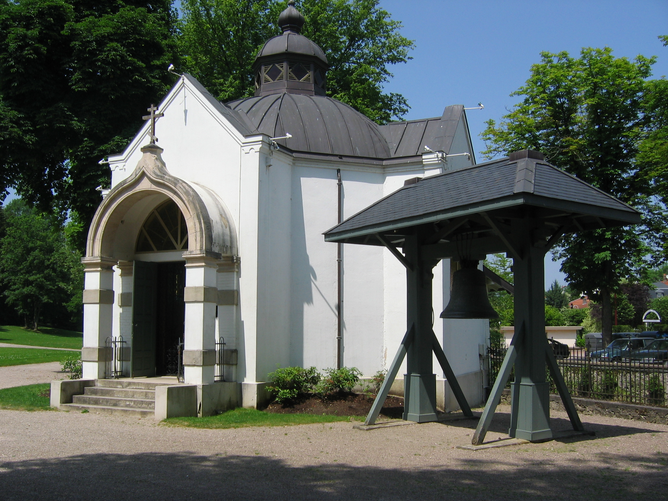 Chapelle de la grande-duchesse Wladimir à Contrexéville, Vosges, Lorraine, France